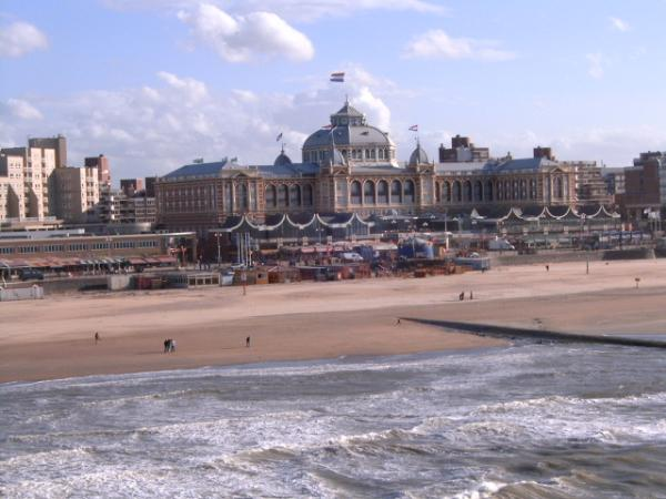 Kurhaus Scheveningen